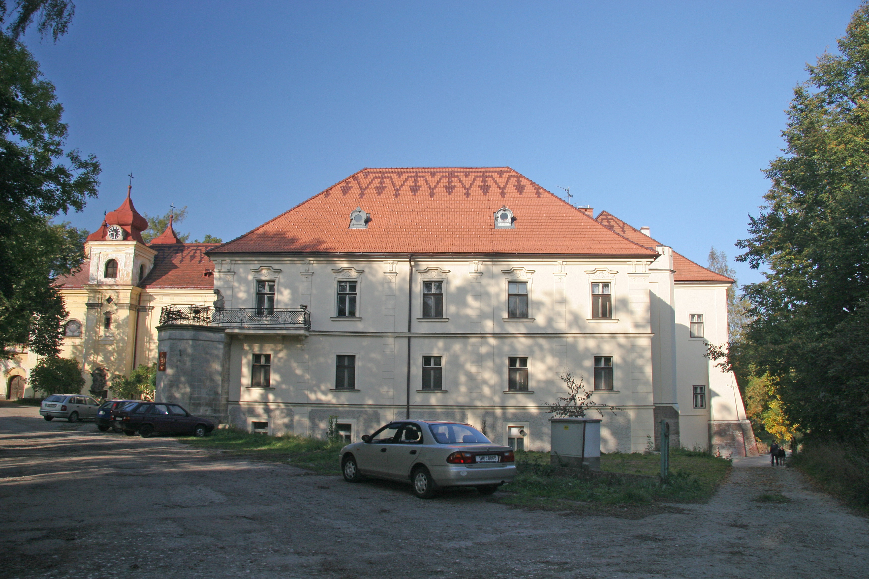 Zámek - bývalá jezuitská rezidence Žireč, Žireč 1